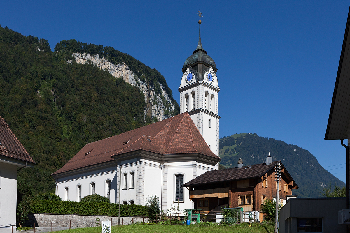 Pfarrkirche Maria Geburt in Wolfenschiessen